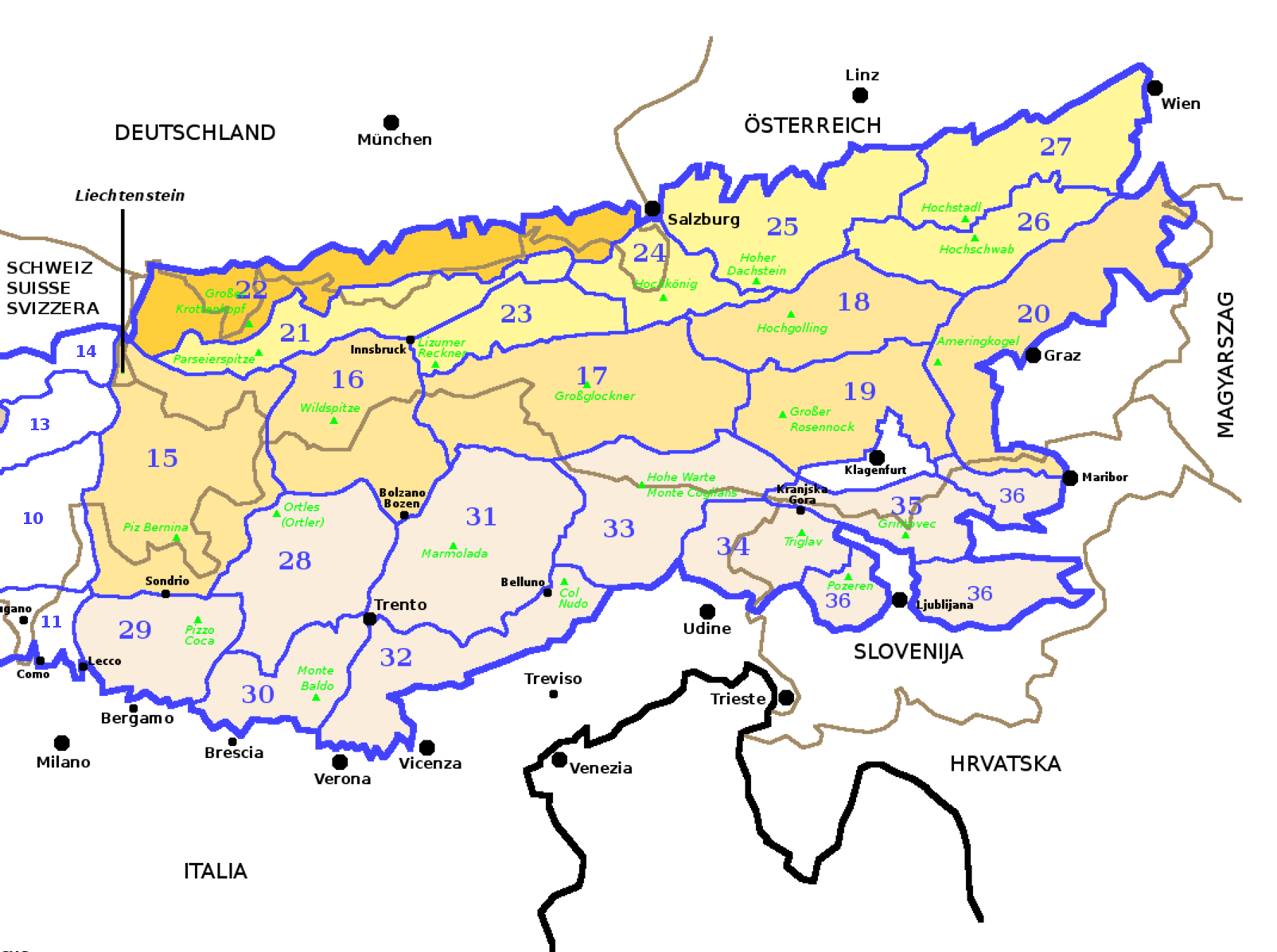 Alpi Orientali secondo la SOIUSA con evidenziate le Alpi Bavaresi